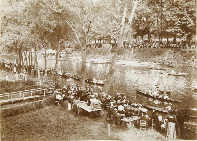 Des gens attablés regardent depuis les berges de Seine et l'île du grand Motteau, une régate